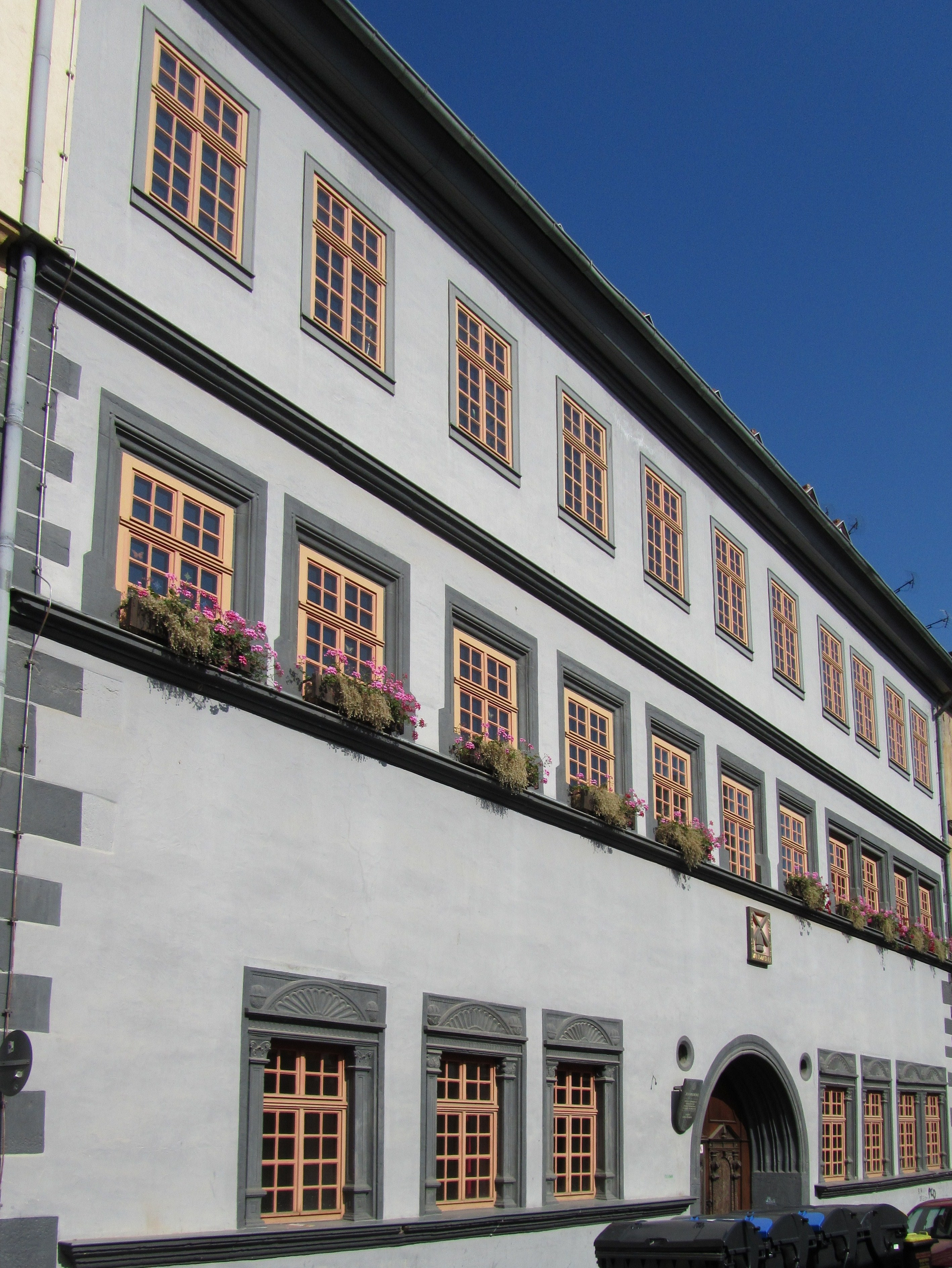 Das Haus zur Windmühle in der Allerheiligenstraße in Erfurt.